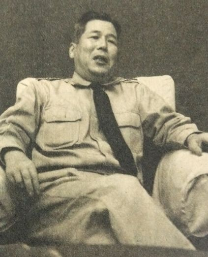 山崎小五郎